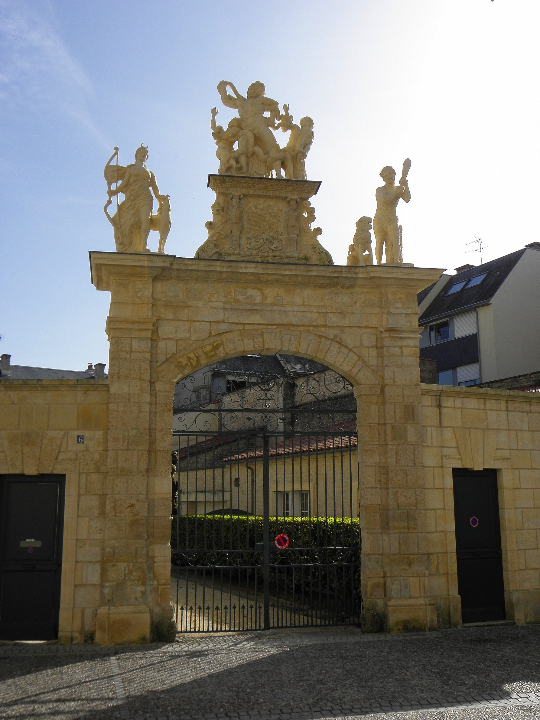 Portail de l'Hôtel dit Château-Gaillard à Fontenay-le-Comte (85).